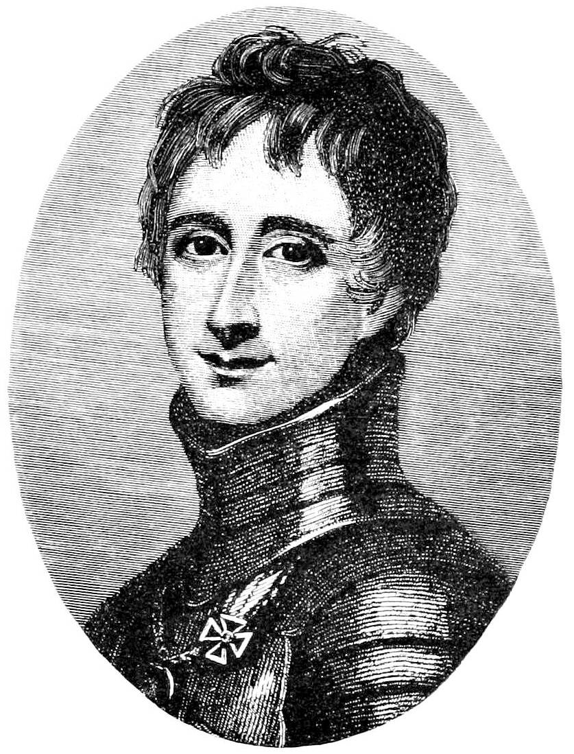 Данное изображение было использовано в статье «Вильсон, Роберт-Томас» опубликованной в шестом томе «Военной энциклопедии», который был издан книгоиздательским товариществом Ивана Дмитриевича Сытина в 1912 году в столице Российской империи городе Санкт-Петербурге.